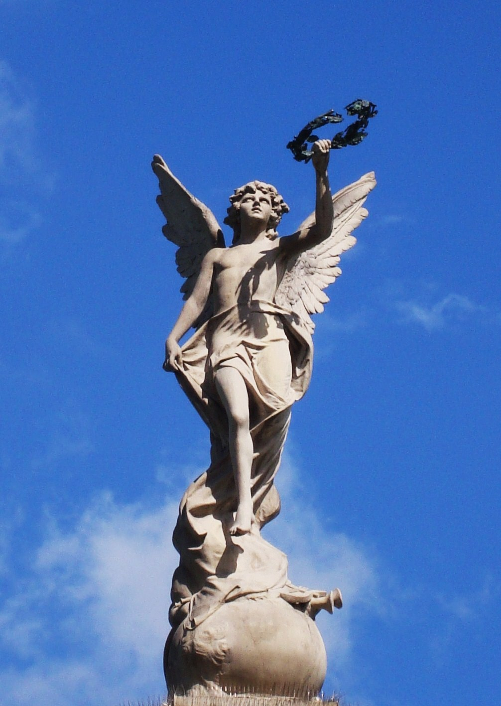 La Fama, de Adriático Foli (1894), en el tímpano del techo del Teatro Nacional de Costa Rica, San José.